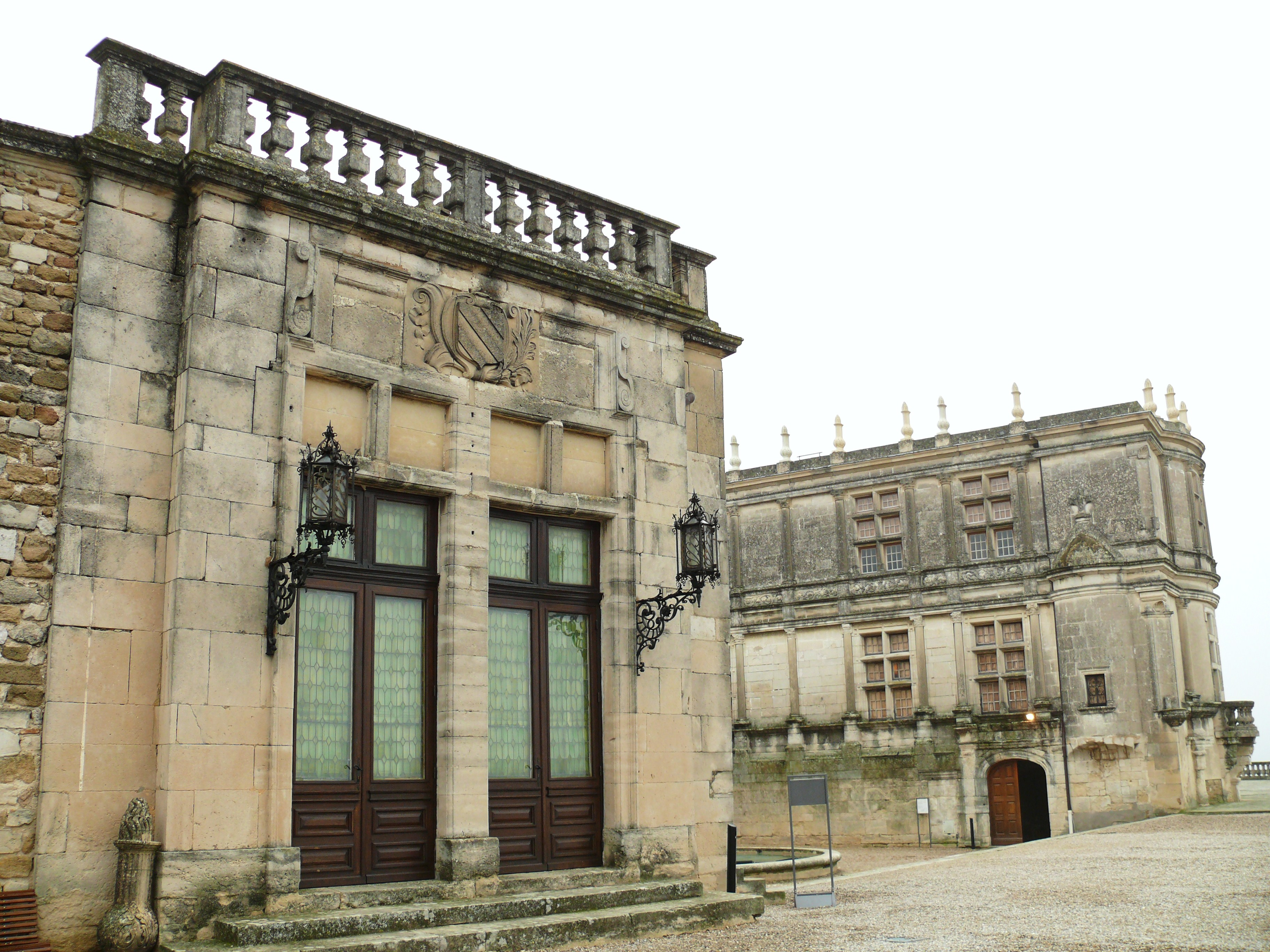 Château de Grignan - Extrémité de l'aile de la galerie des Adhémar